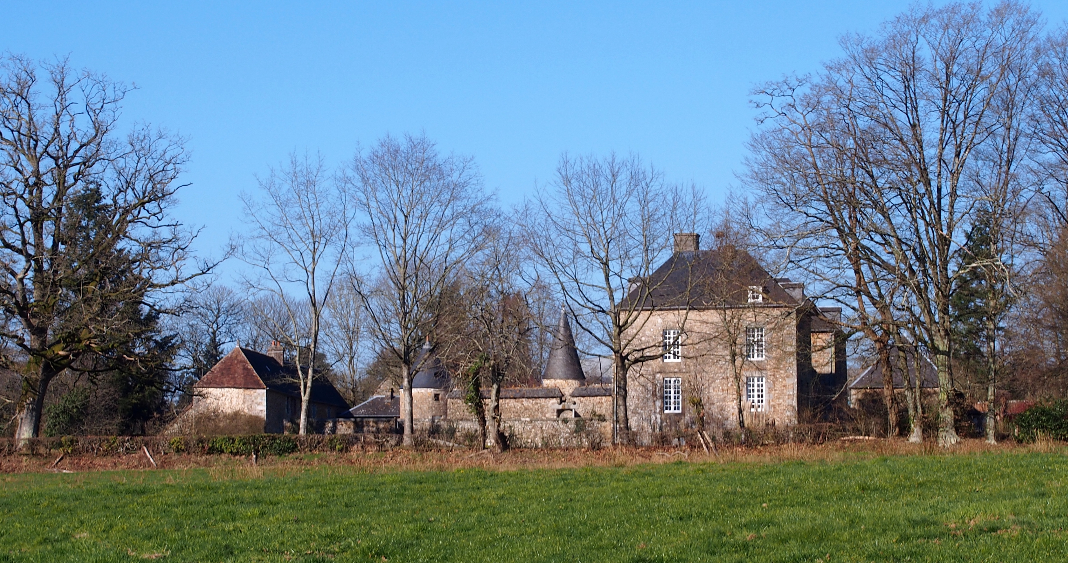 La Haute-Chapelle (Normandie, France). Le manoir de la Guyardière.